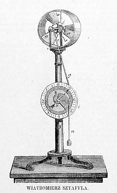 Anemometr, Izrael Abraham Staffel